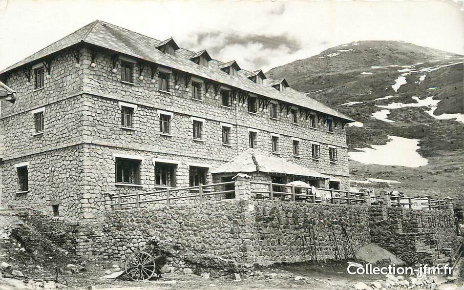 Porté (Pyrénées-Orientales, France) - Le Grand Hôtel.